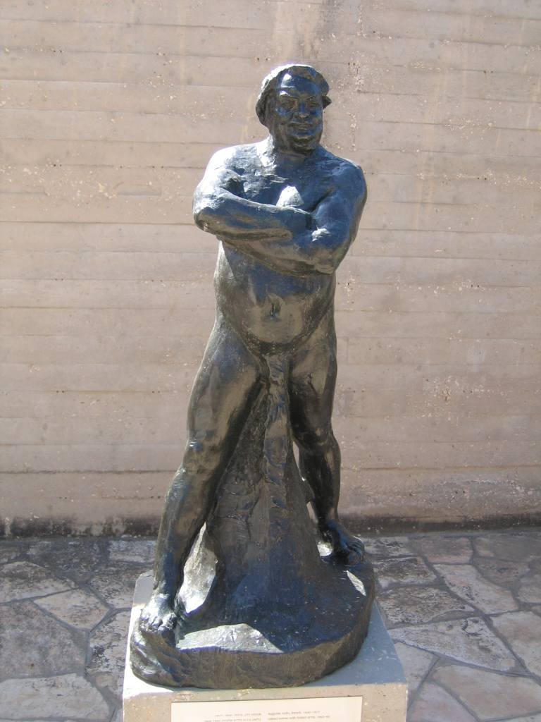 Auguste rodin, Balzac at the israel Museum, Jerusalem. yair talmor, 16.3.2006